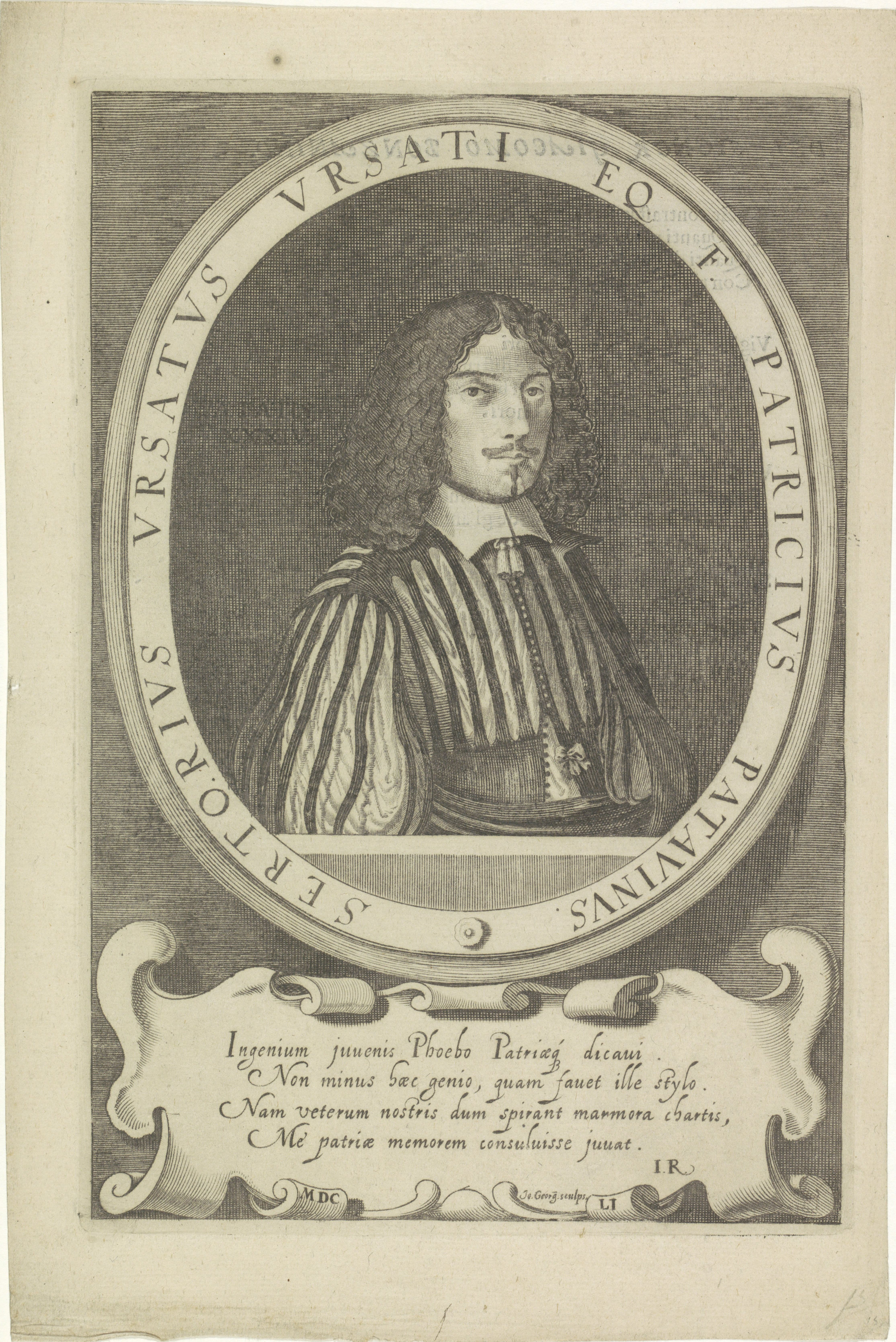 IdentificatieTitel(s): Portret van Sertorius UrsatusObjecttype: prent boekillustratie Objectnummer: RP-P-1909-4958Opschriften / Merken: verzamelaarsmerk, verso, gestempeld: Lugt 2228VervaardigingVervaardiger: prentmaker: Giovanni Georgi (vermeld op object)Plaats vervaardiging: ItaliëDatering: 1651Fysieke kenmerken: gravure; tekst in boekdruk op versoMateriaal: papier Techniek: graveren (drukprocedé) / boekdrukAfmetingen: plaatrand: h 250 mm × b 167 mmOnderwerpWat: historical personsWie: Sertorius UrsatusVerwerving en rechtenVerwerving: aankoop 1905Copyright: Publiek domein